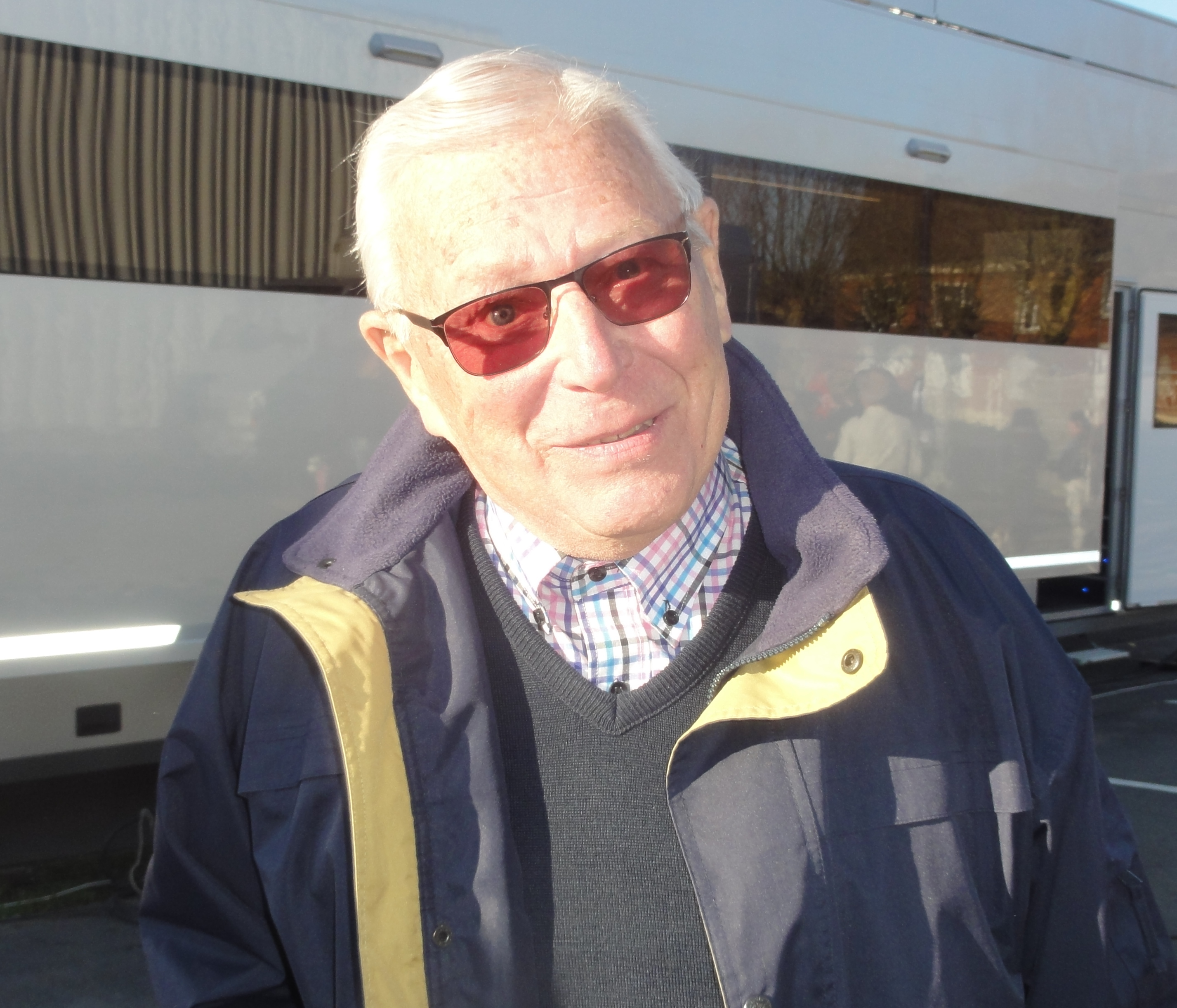 Reportage réalisé le dimanche 24 mars à l'occasion du départ et de l'arrivée du Grand Prix de Denain 2019 à Denain, Nord, Nord-Pas-de-Calais-Picardie, France.